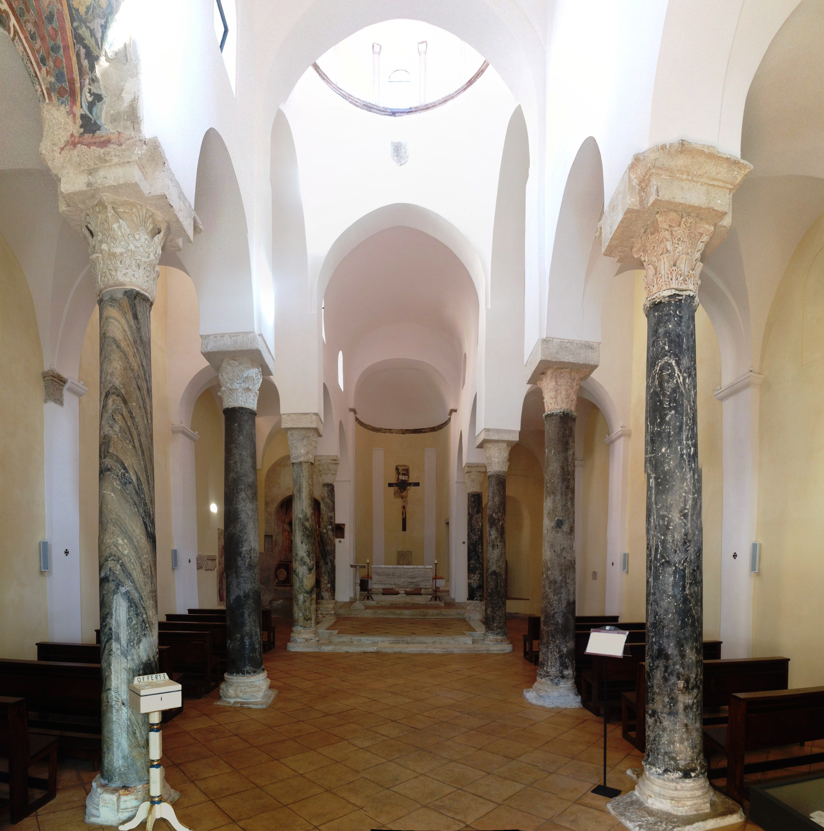 Interno a croce latina e tre navate della chiesa di San Giovanni a Mare a Gaeta (XII-XIII secolo).